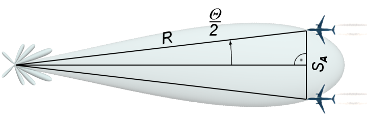 Das Winkelauflösungsvermögen eines Radars kann sowohl als Winkel (Θ) angegeben werden, als auch als ein von der Entfernung (R) abhängiger Abstand (SA).